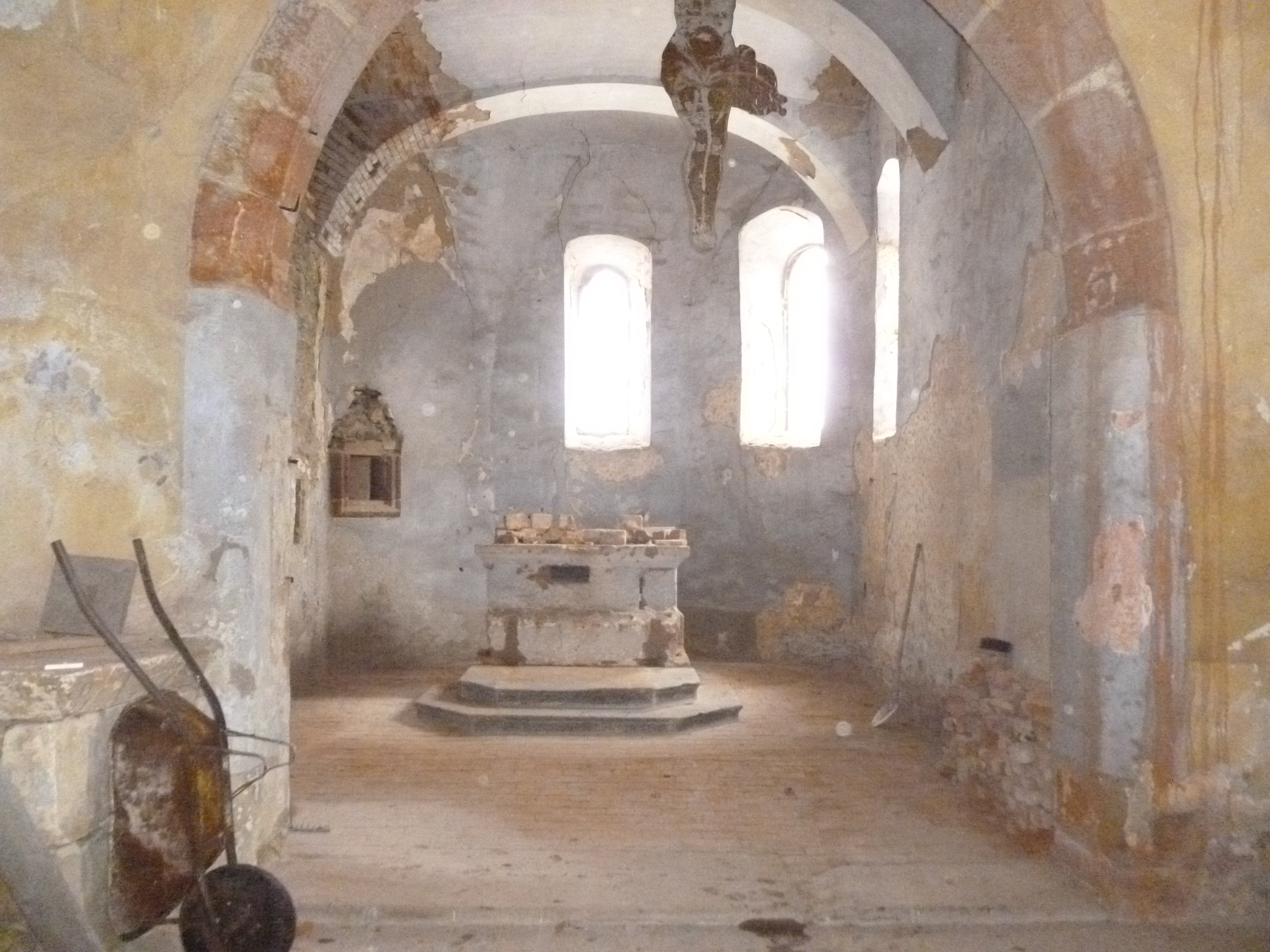 Kostel Všech svatých (Čichalov) vnitřek kostela